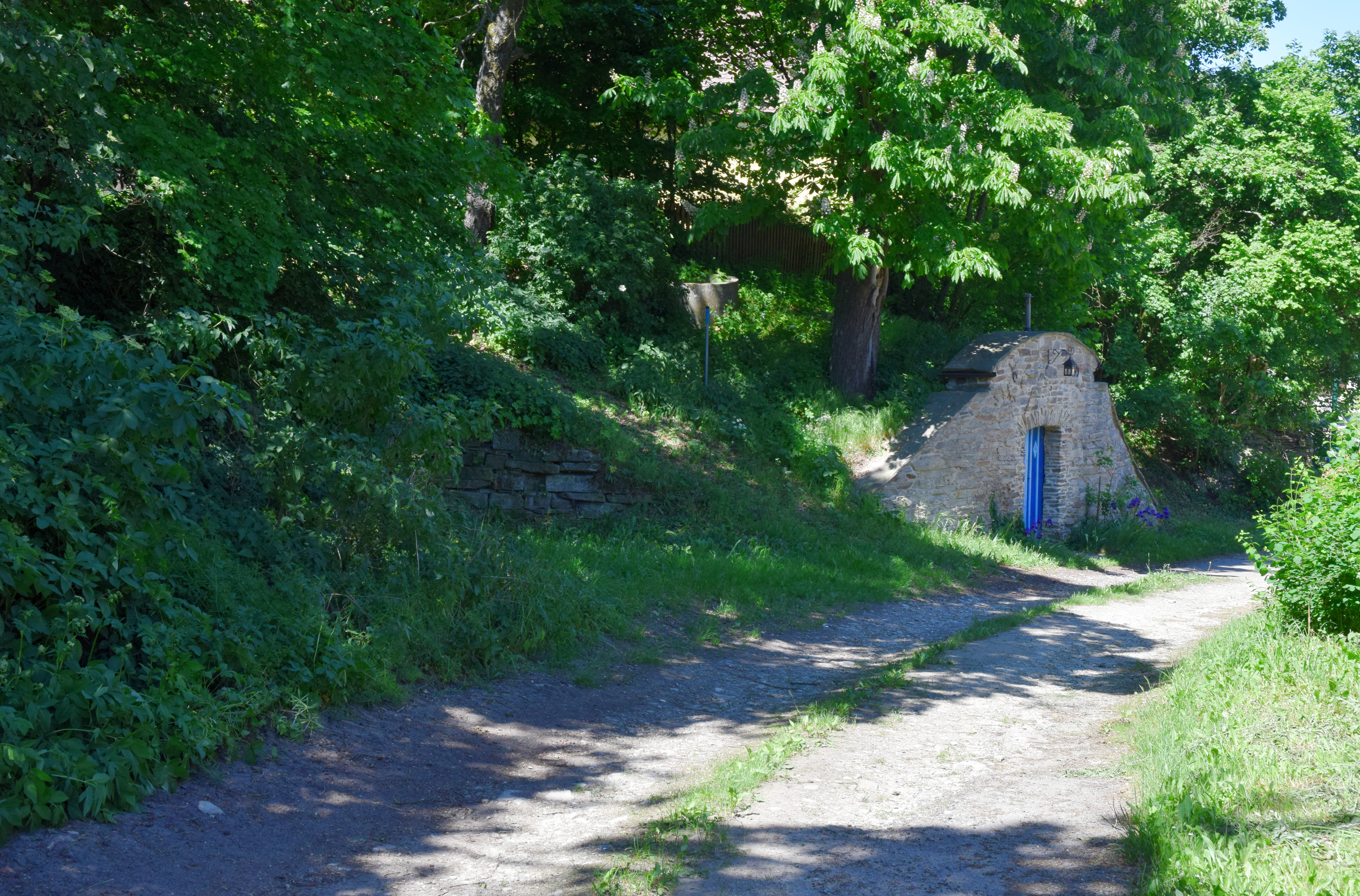 Kellergasse in Mörtersdorf, Gemeinde Rosenburg-Mold / Niederösterreich